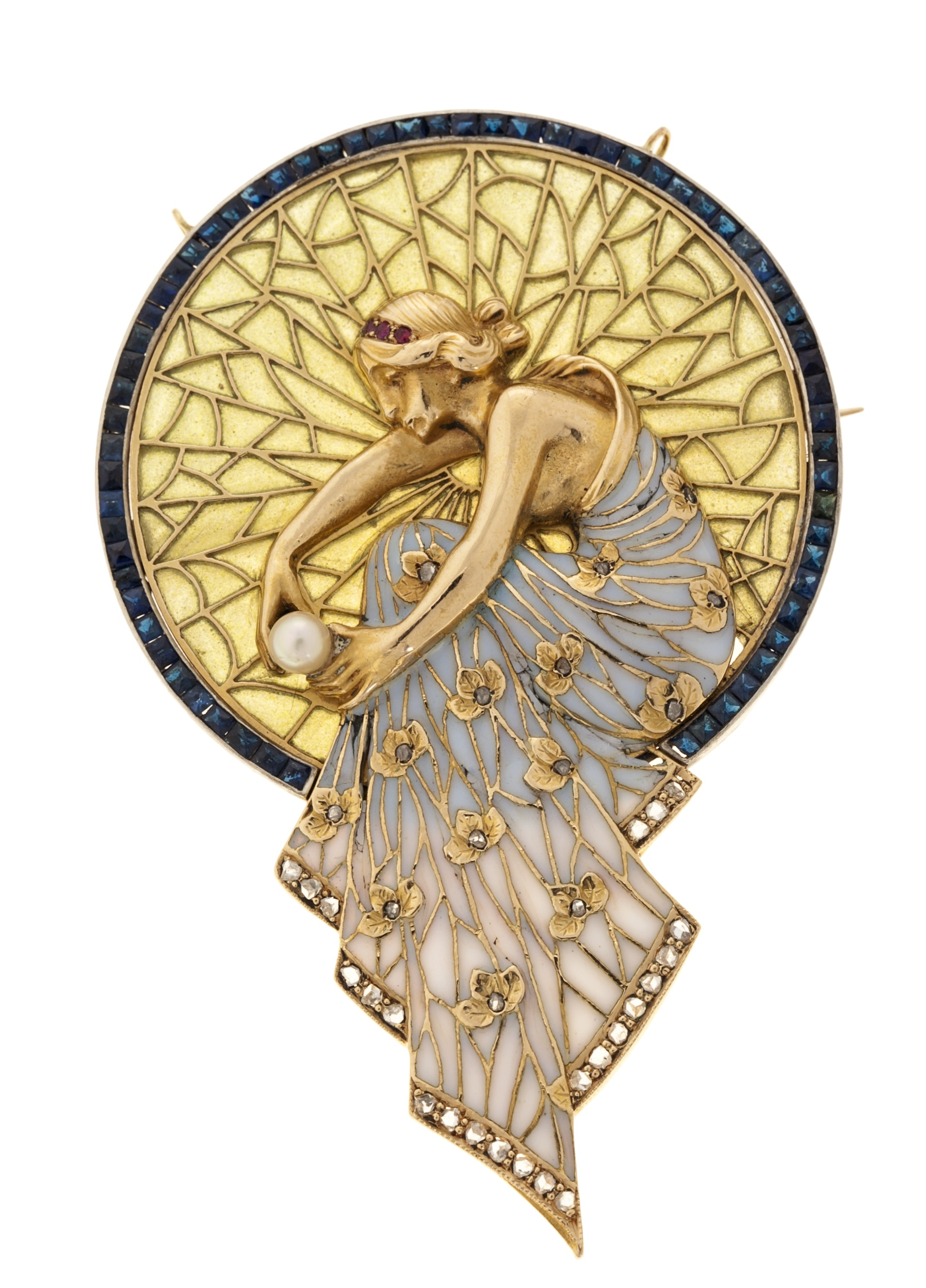 Fermall d'or, diamants talla rosa, 0,26 cm., robins talla rodona, 0,03 cm., perla rodona, 3,5 mm diàmetre, esmalt 'plique-à-jour' i símil de safirs. No signat. Bibliografia de referència: 'Els Masriera', Barcelona, 1996, pg. 122.